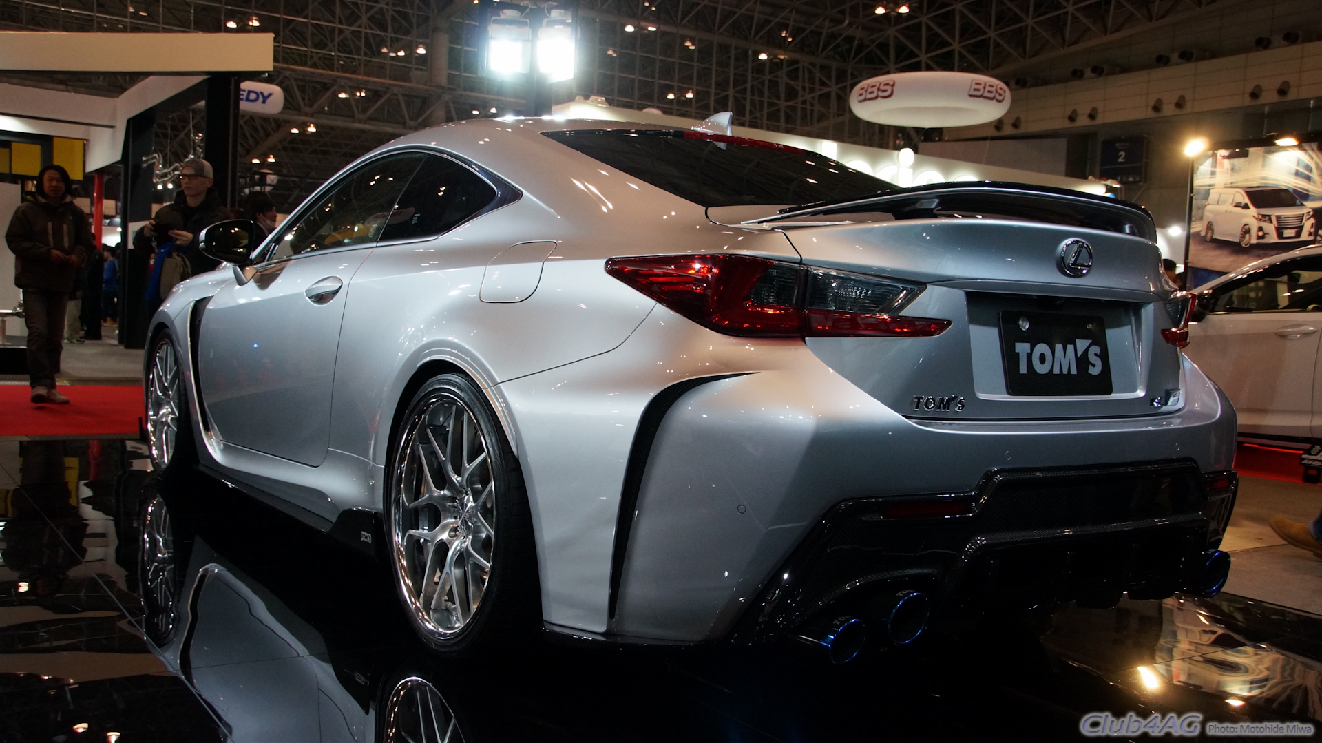 Tokyo Auto Salon 2016 Cars